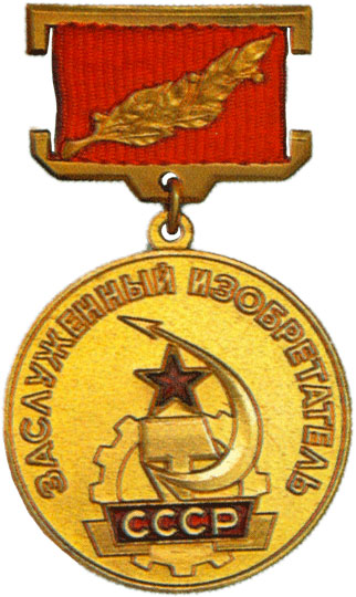 Знак «Заслуженный изобретатель СССР»